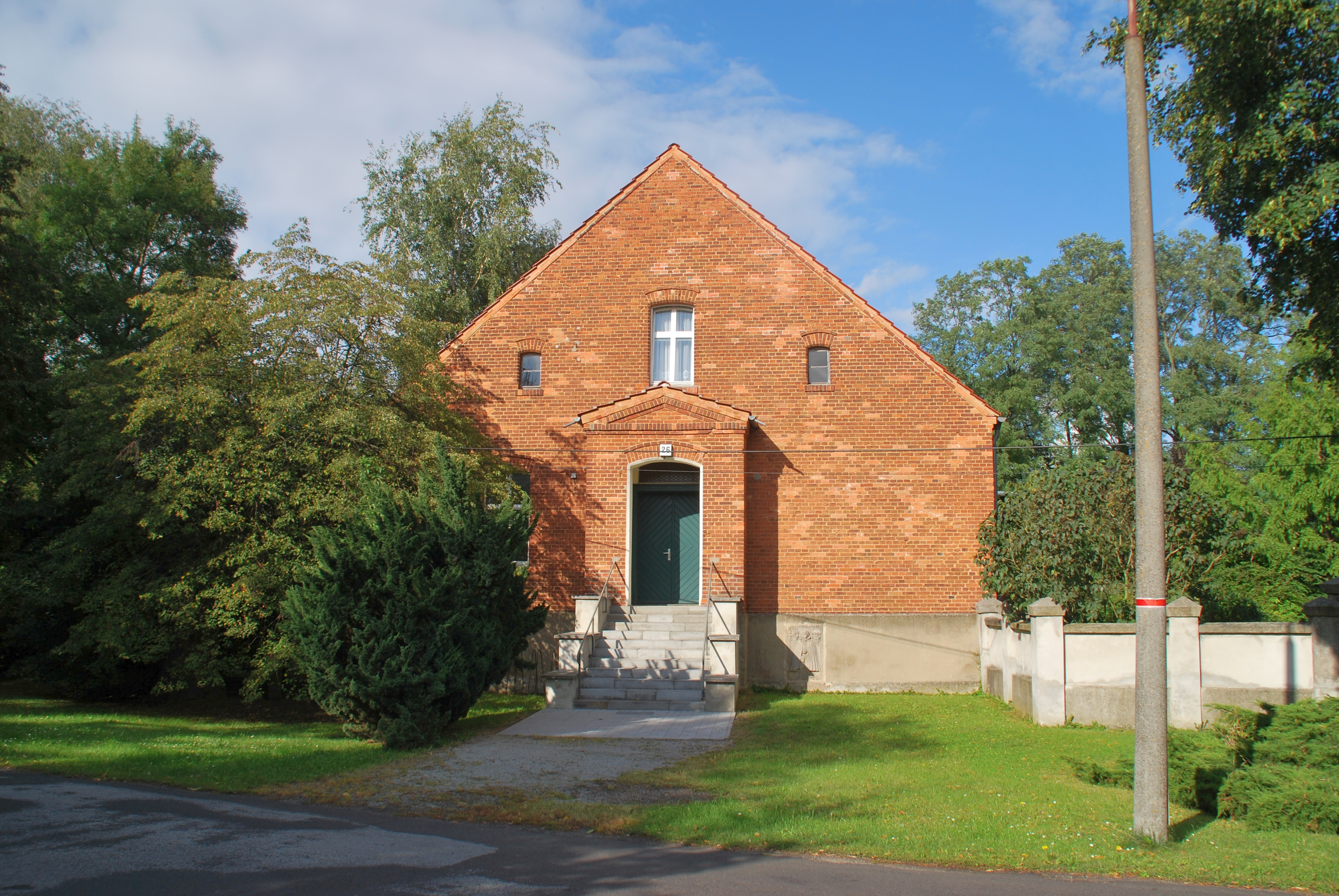 Pfarrhaus Rathstock - Frontalansicht